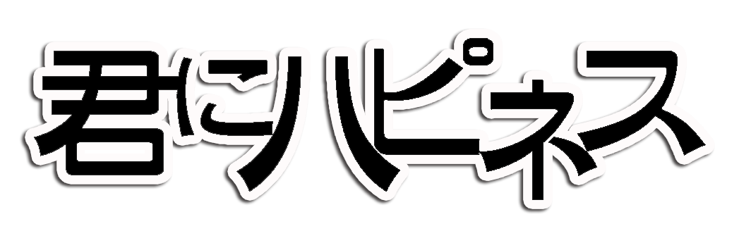 つくばテレビ「君にハピネス」タイトルロゴ